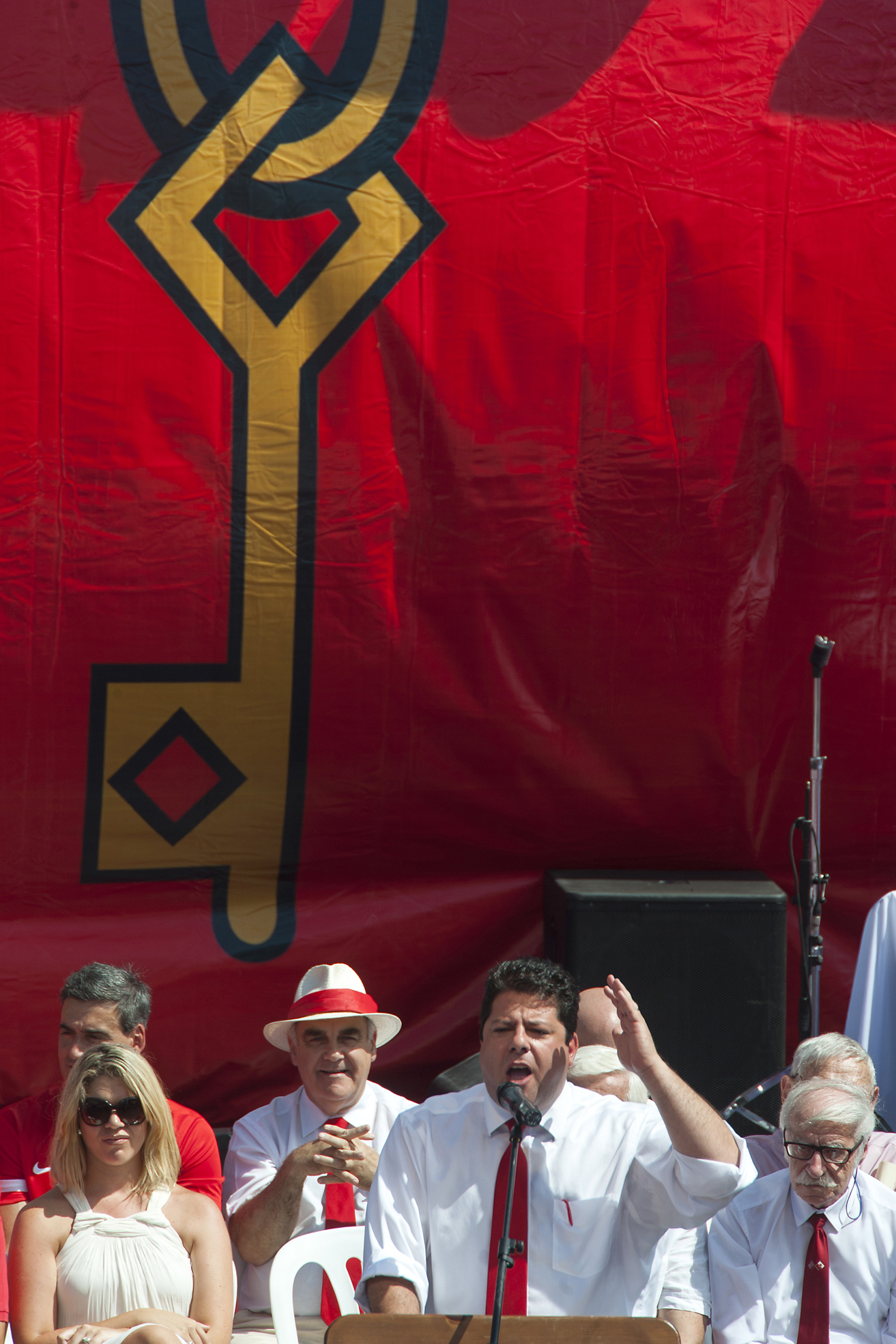 GIBRALTAR NATIONAL DAY 2013 - 238